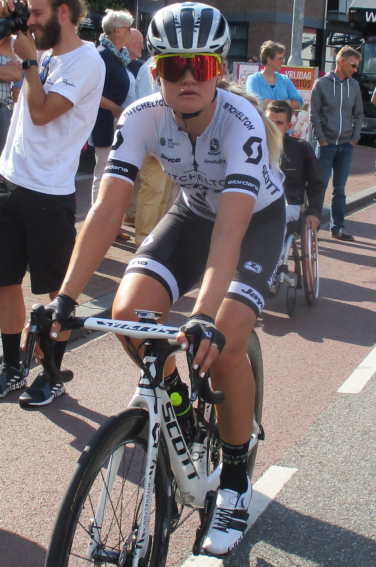 4e etappe van de Boels Ladies Tour 2018 door Noord-Limburg, finish in Weert.